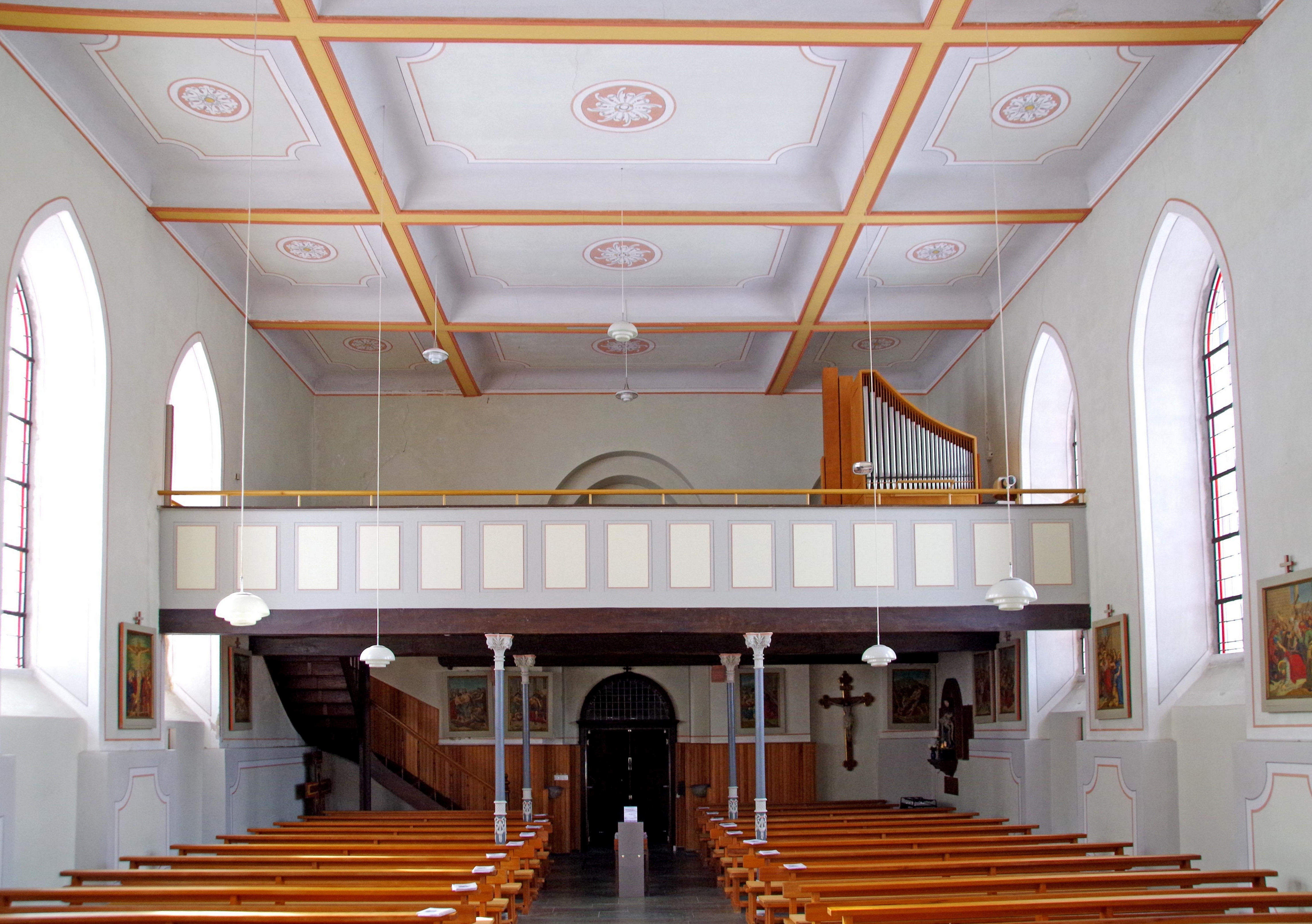 St. Dionysius (Gondenbrett), Innenraum mit Orgelempore im Westen